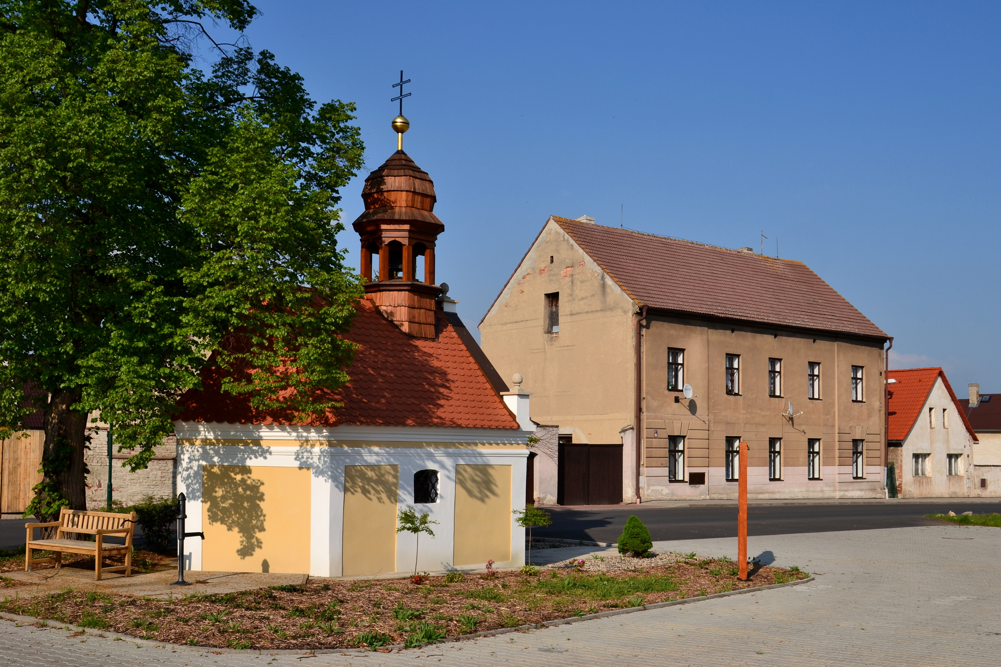 Hořenec - náves s kaplí svaté Anny